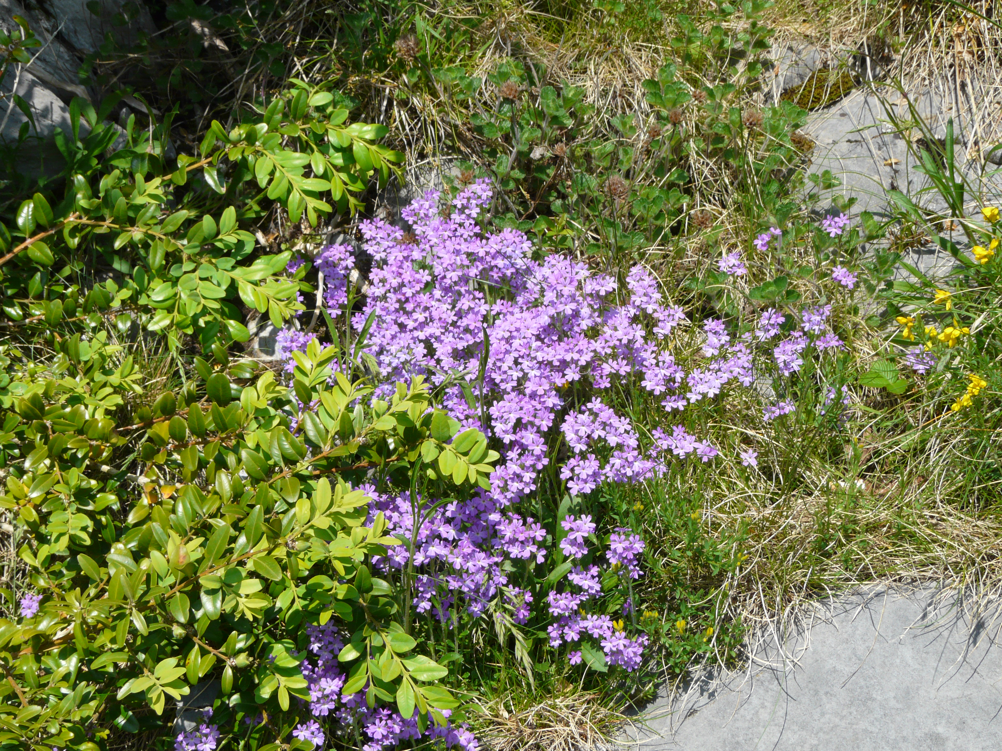 Érine des Alpes (Erinus alpinus) au Pic du Jer, Lourdes, Hautes-Pyrénées, France.